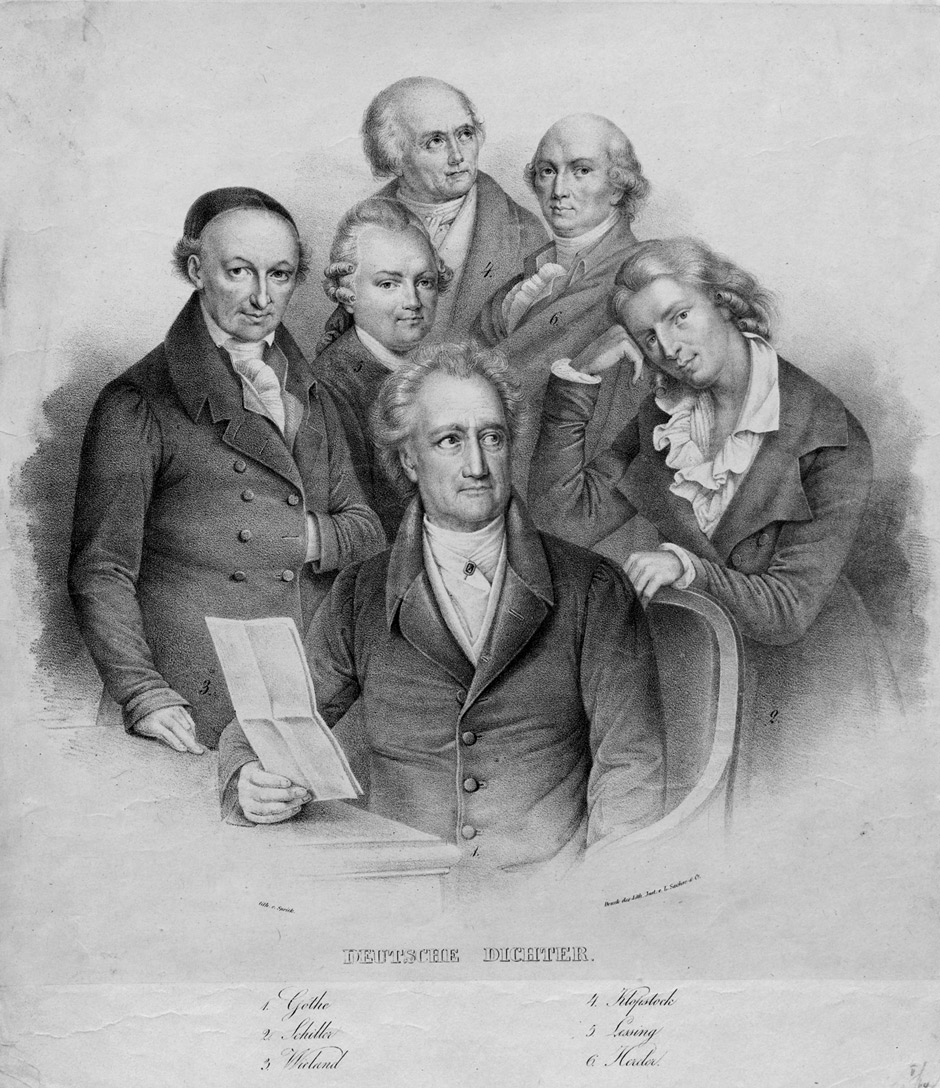 Deutsche Dichter: Goethe; Schiller; Wieland; Klopstock; Lessing; Herder. Kreidelithographie 33,5 x 29,6 cm. Druck des Lith. Inst. v. L. Sachse & Co.